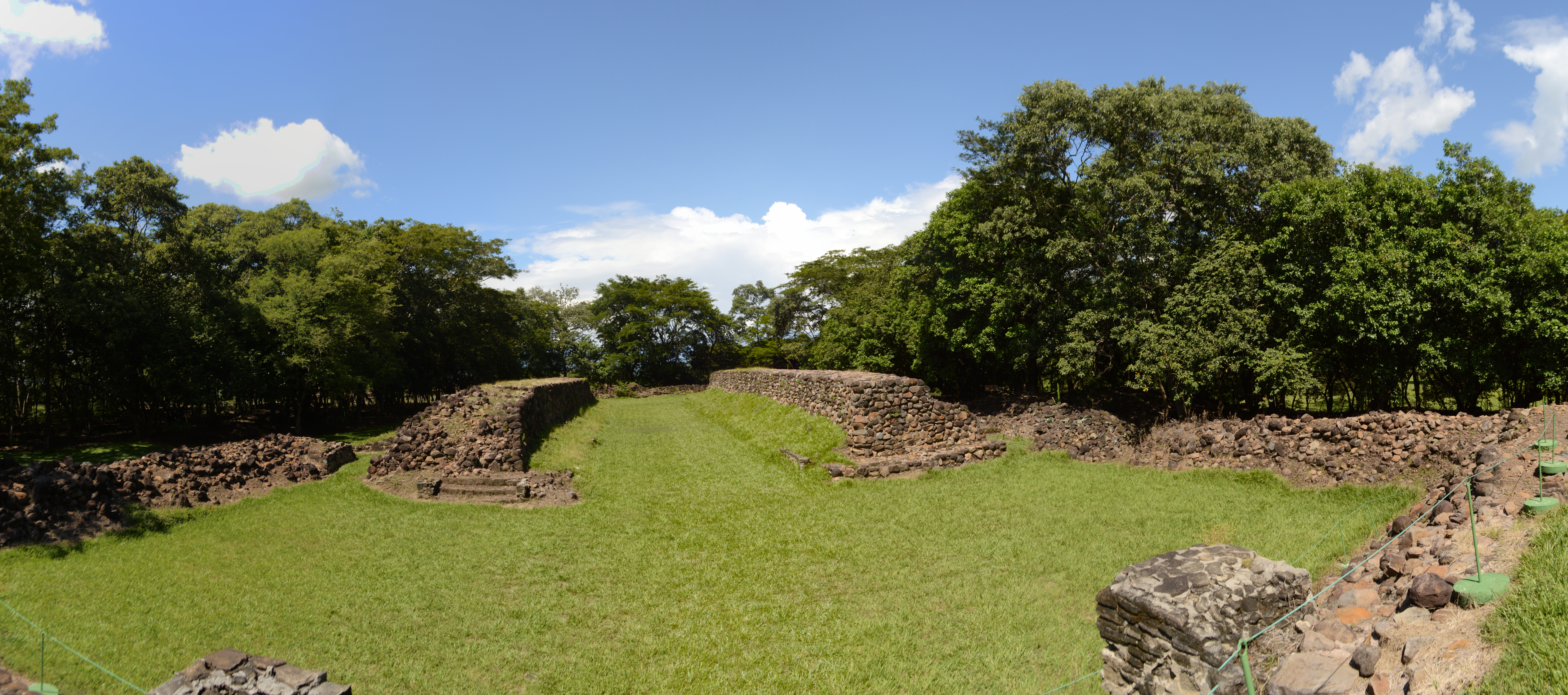 Juego de Pelota principal, Sitio arqueologico Cihuatan, Aguilares San Salvador, El Salvador